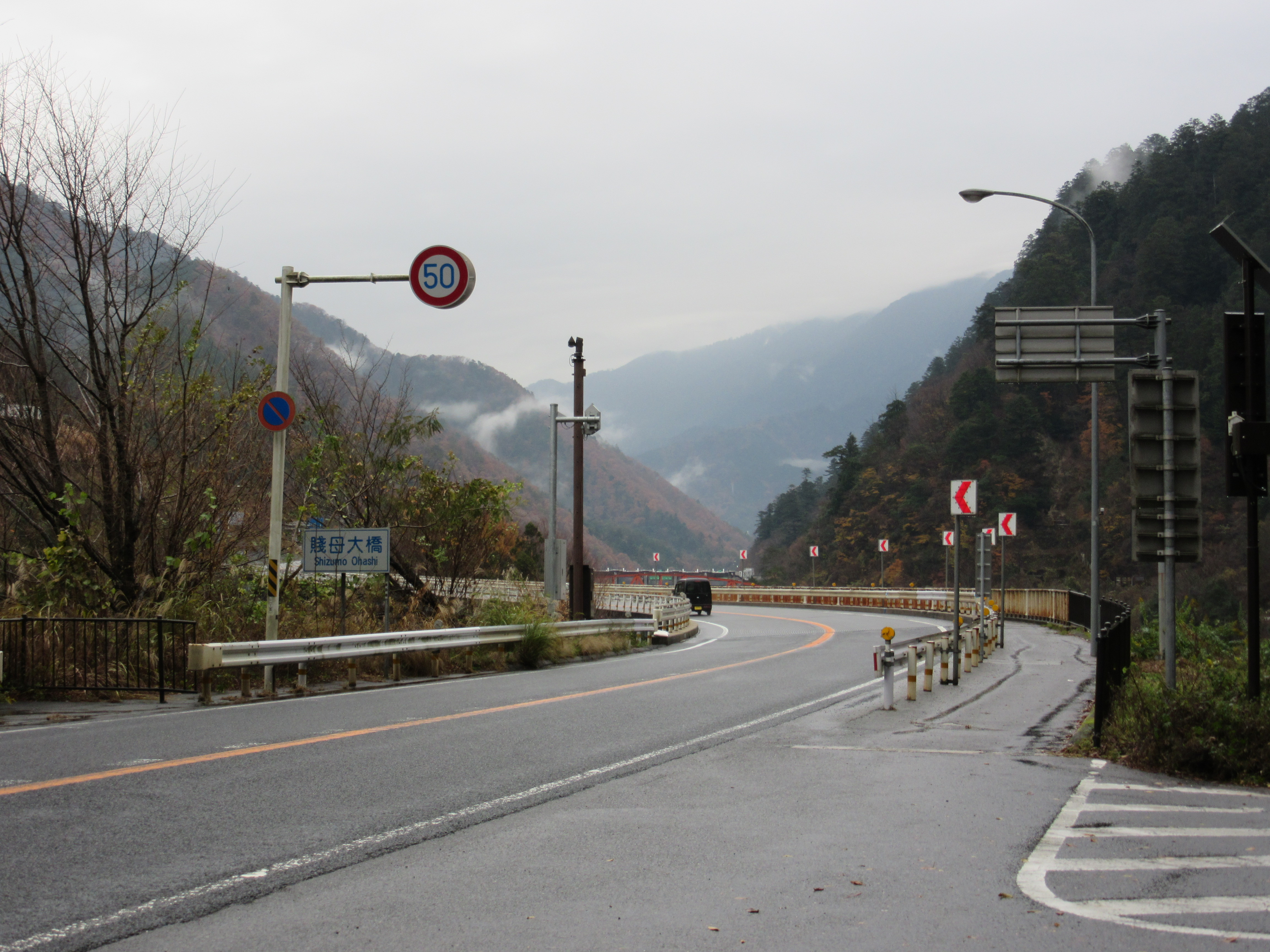 賤母大橋（国道19号）